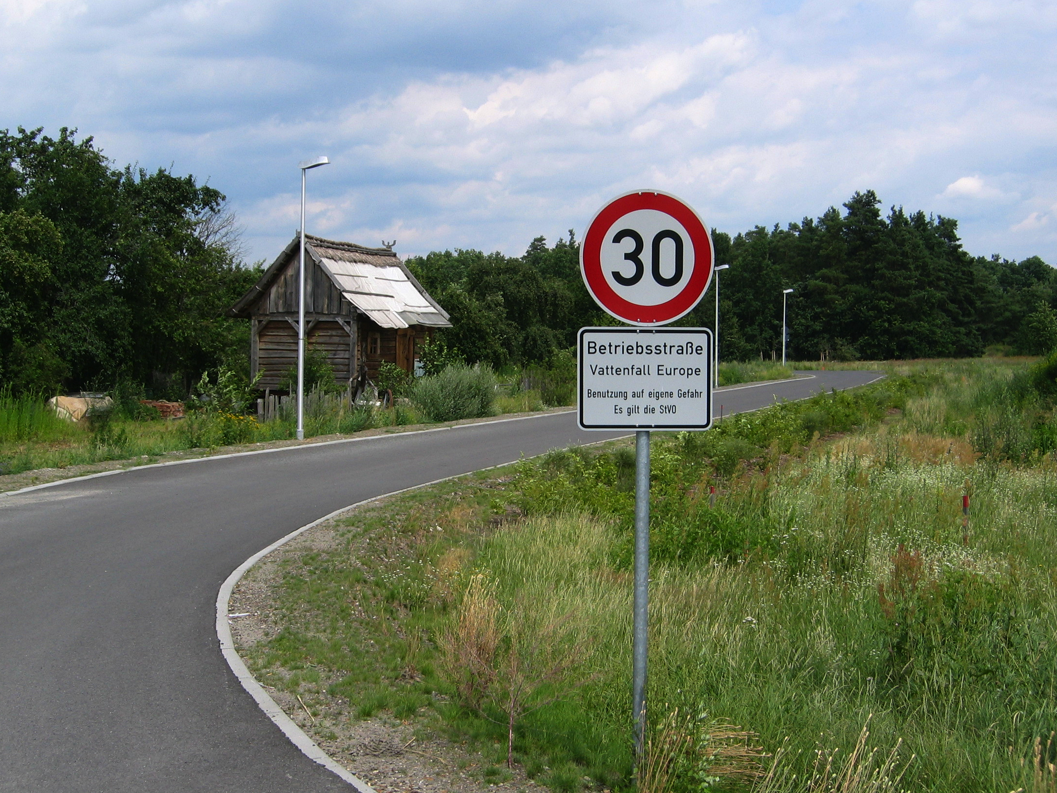 Das „wandernde Haus“ an einer neuen Vattenfall-Betriebsstraße in Lakoma, Cottbus, Deutschland.